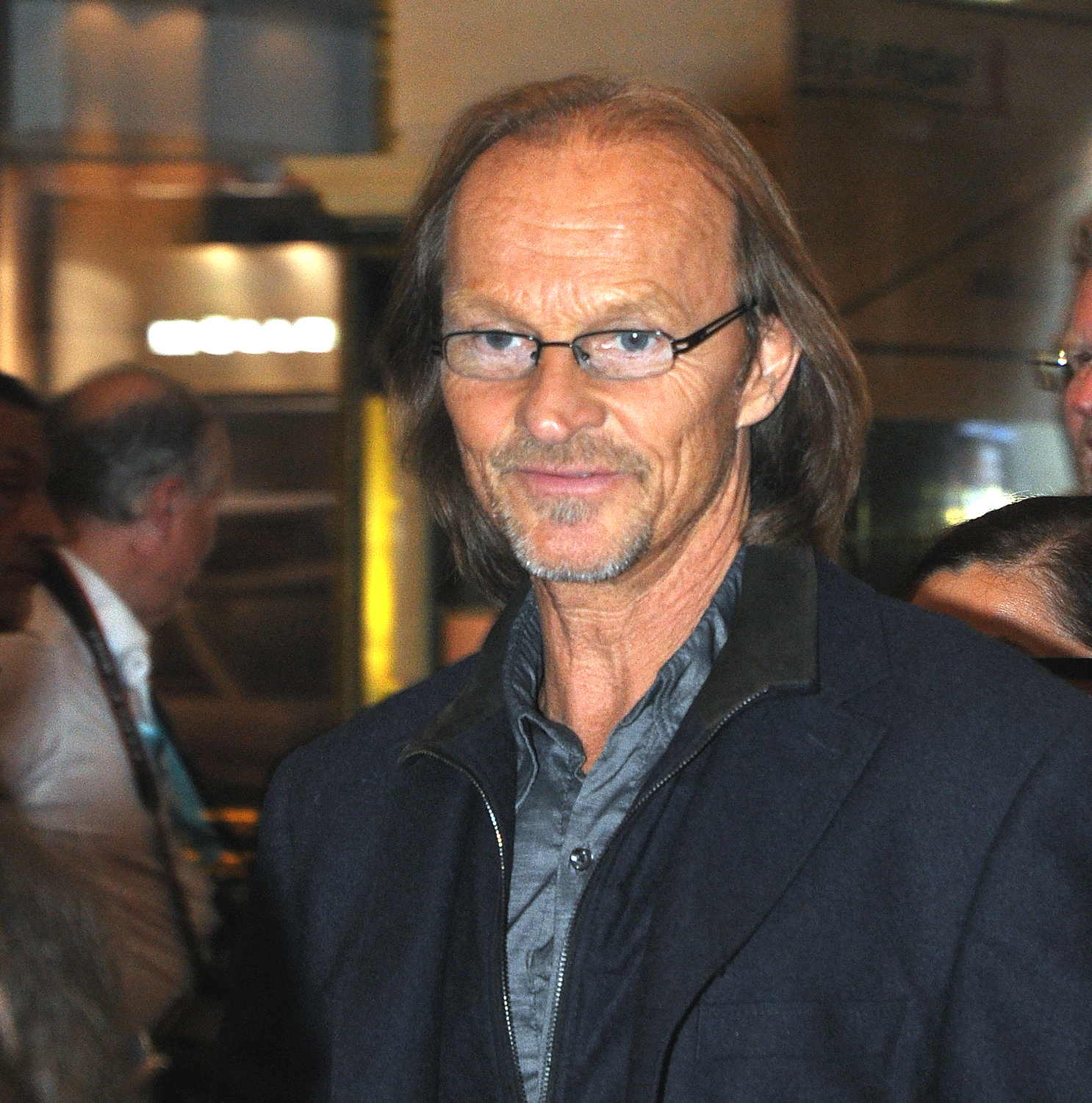 Eisi Gulp bei der Eröffnungsfeier des 33. Münchner Filmfestes 2015 im Hotel Bayerischer Hof